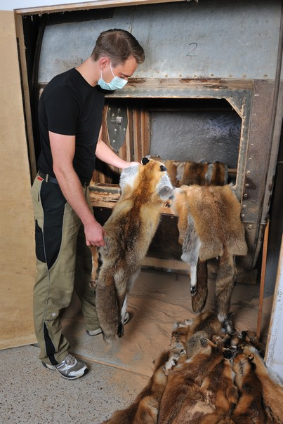 Die fertig zugerichteten Rotfuchsfelle kommen aus der Läutertonne. Udo Meinelt & Söhne, Rötha